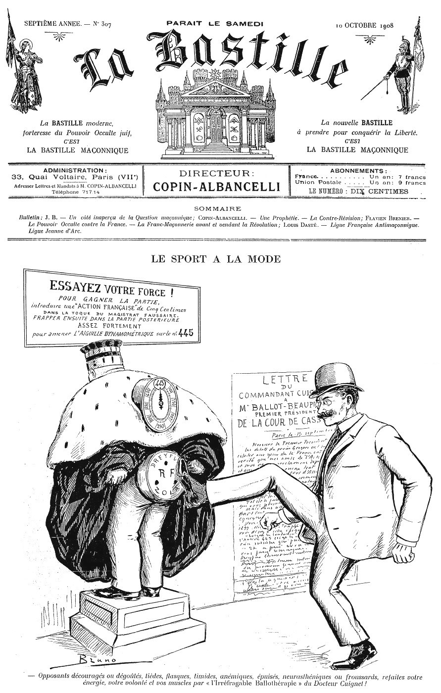 La Bastille (directeur : Copin-Albancelli) du 10 octobre 1908, avec une caricature de Bruno à propos de la lettre ouverte du commandant Cuignet à Ballot-Beaupré, premier président de la Cour de cassation.